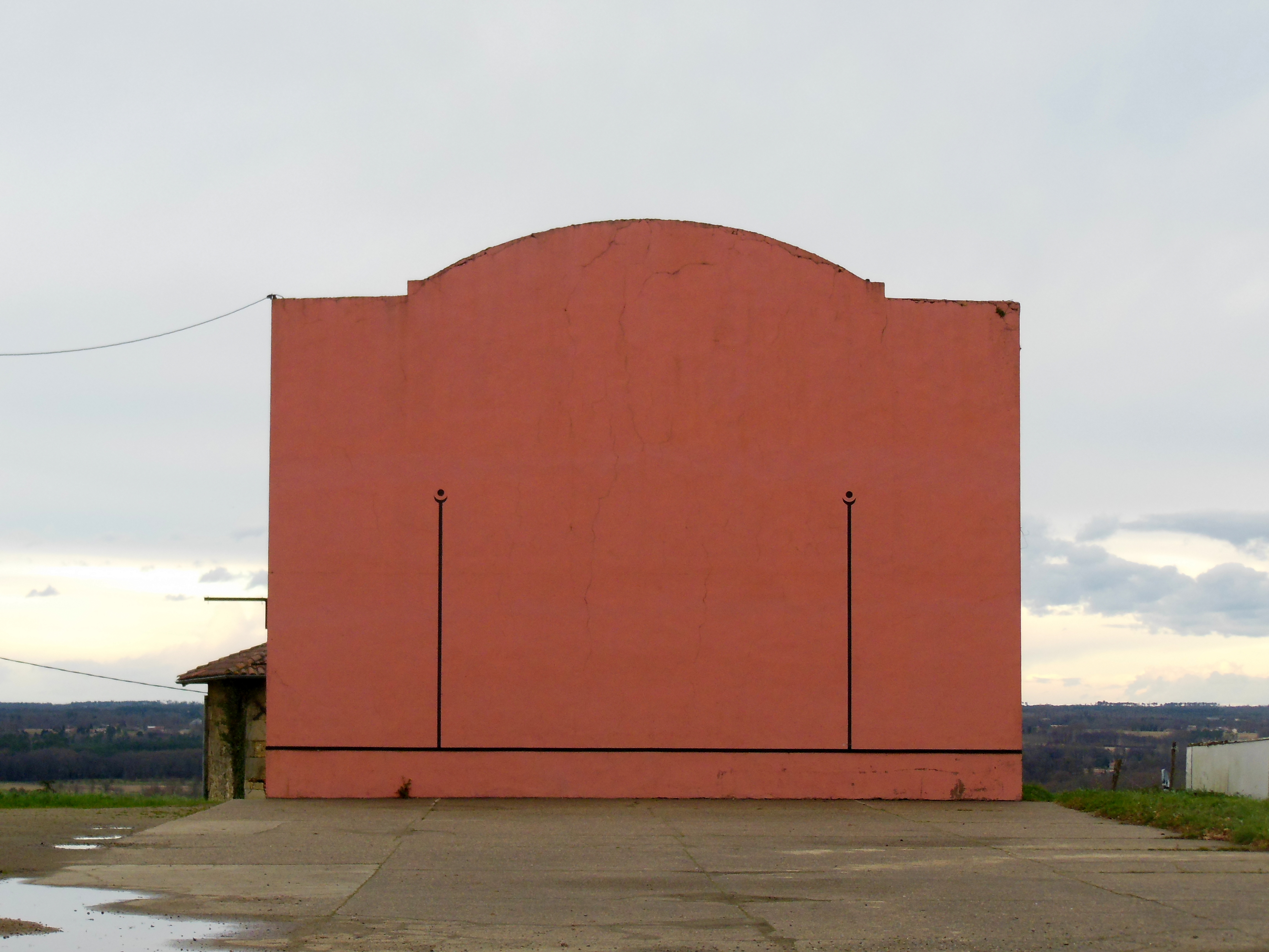 Fronton de Mugron, dans le département français des Landes